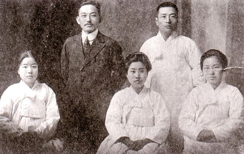 나혜석의 가족사진(왼쪽부터 나혜석, 남편 김우영, 오빠 나경석, 여동생 나지석, 친구이자 최초의 여성 개업의 허영숙)